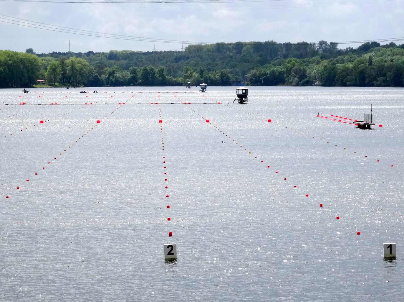 Tor regatowy w Brdyujściu w Bydgoszczy